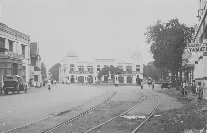 foto. Collectie Spekking +/- 1920.. Straatgezicht in Soerabaja